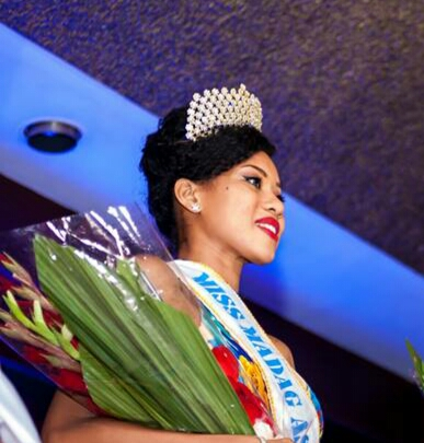 sacre Miss Madagascar 2017